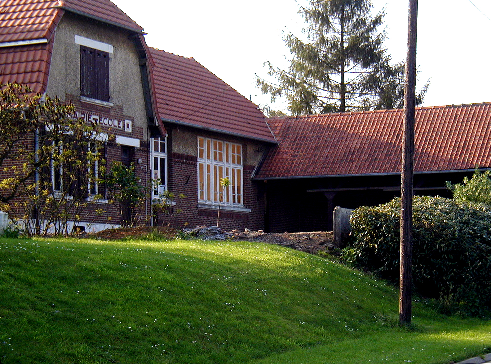 Bazentin (Somme, Picardie, France)